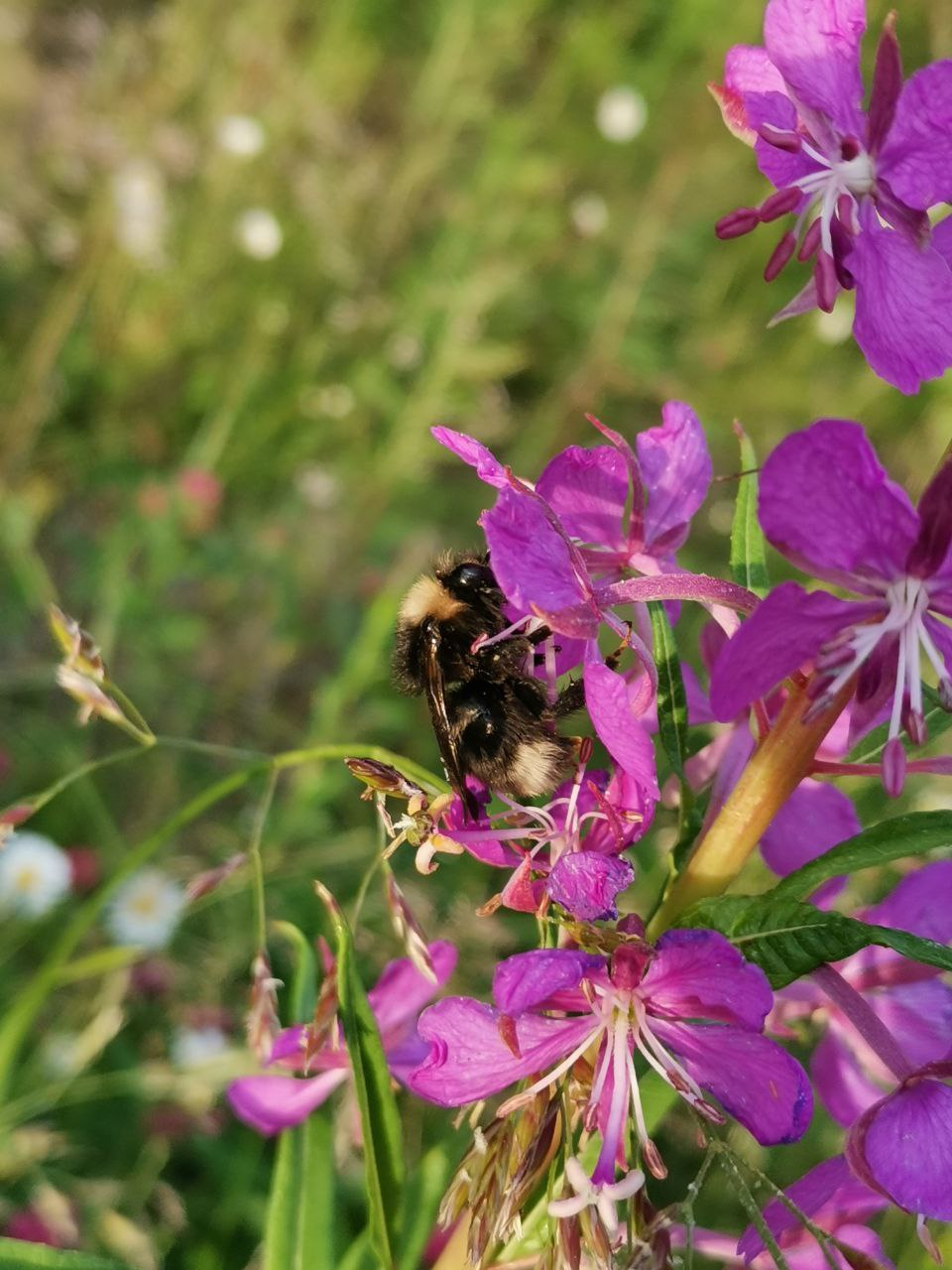 Шмель, сидящий на цветке иван-чая.